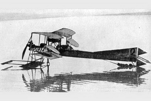 Dufaux 4 seaplane on Lake Geneva in 1910